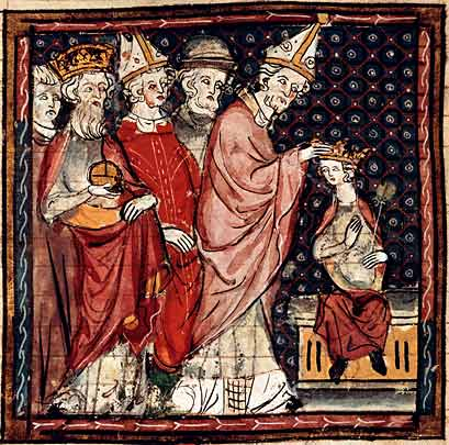 « Couronnement de Louis Ier le Pieux » représente le couronnement, en présence de Charlemagne, de Louis le Pieux par le pape Adrien Ier, en 781. Enluminure illustrant un manuscrit des Grandes Chroniques de France, XIVe siècle. Musée Goya, Castres.